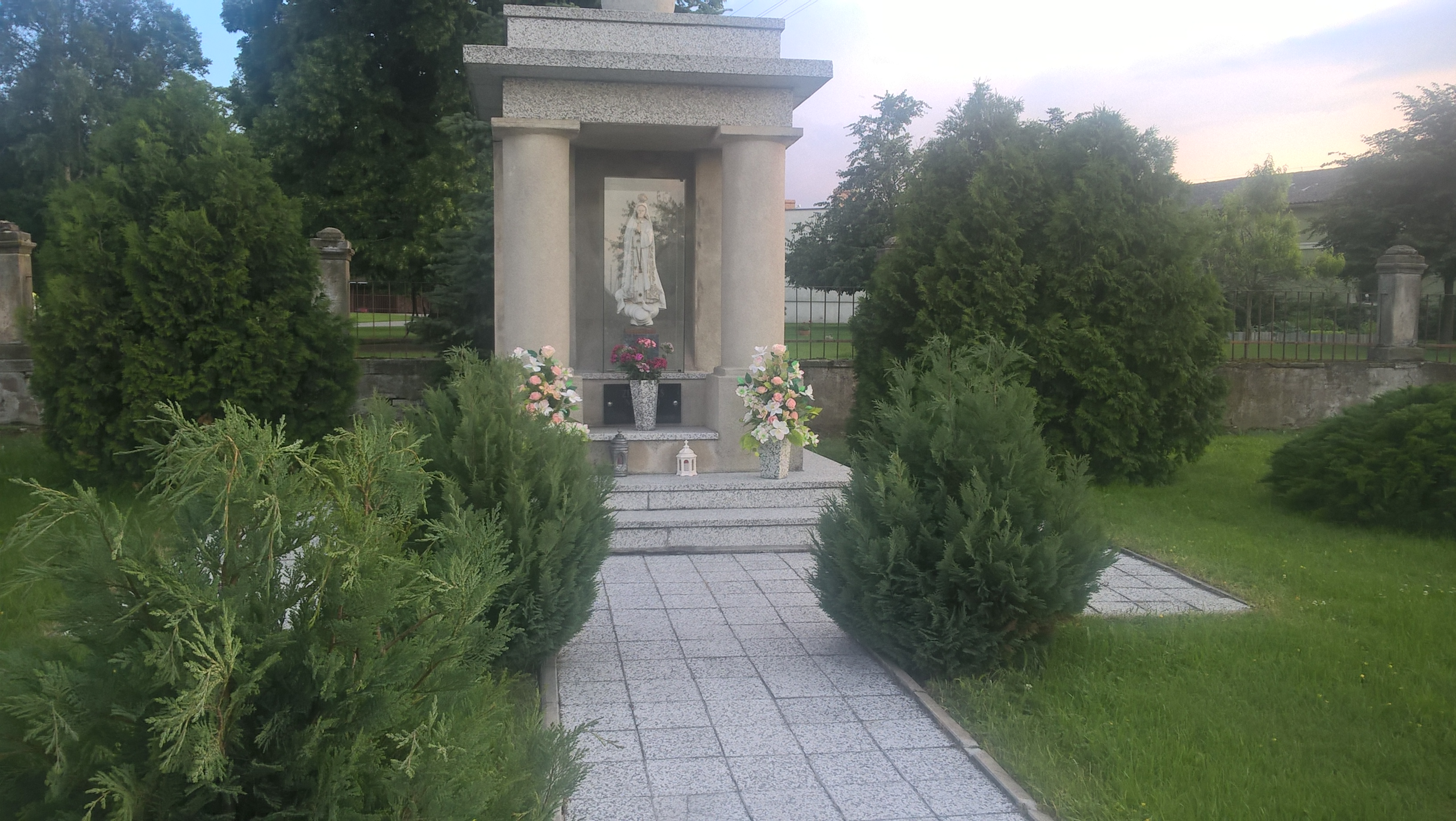 Rudki, figura Matki Boskiej